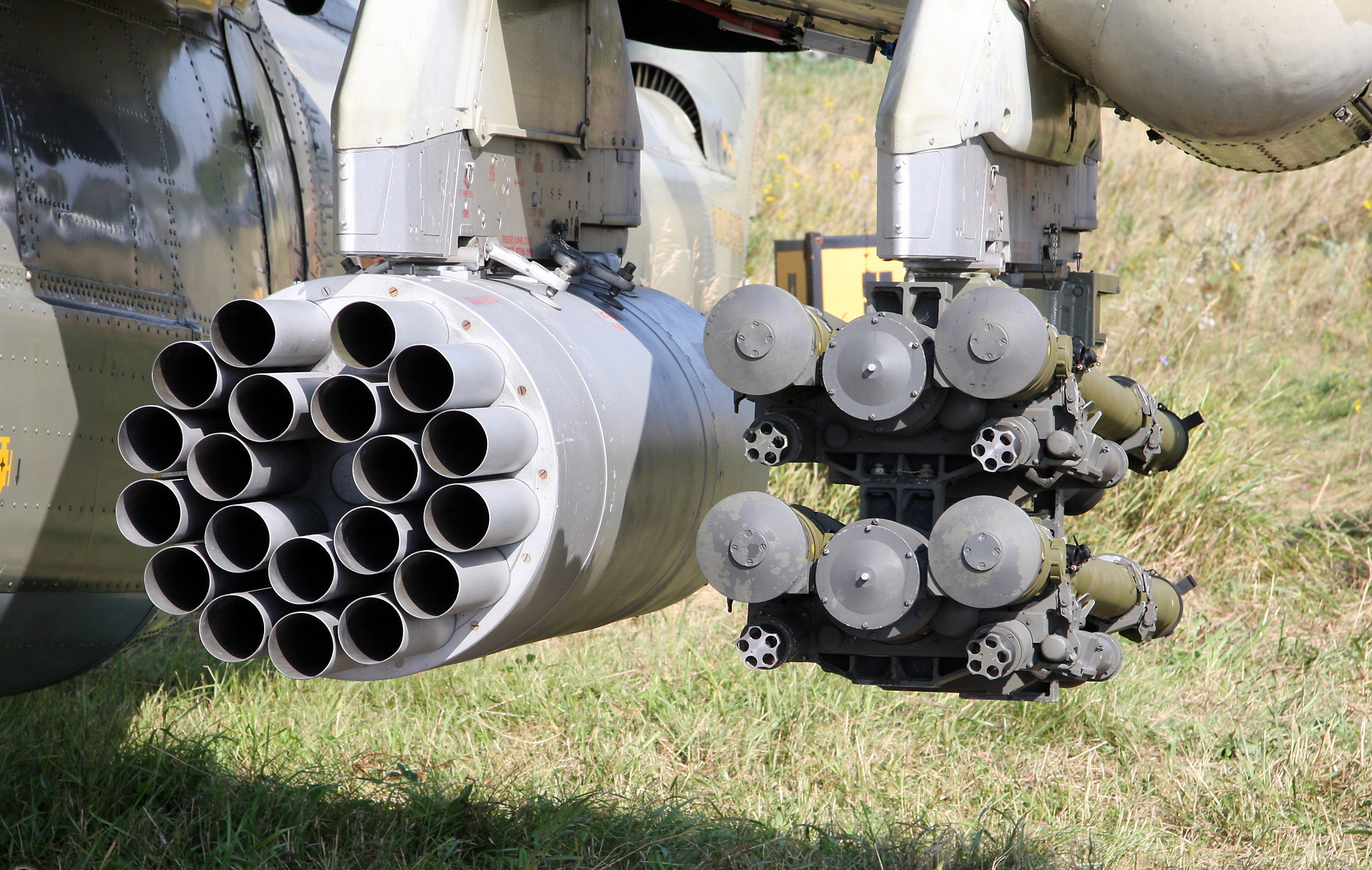 Ми-28Н